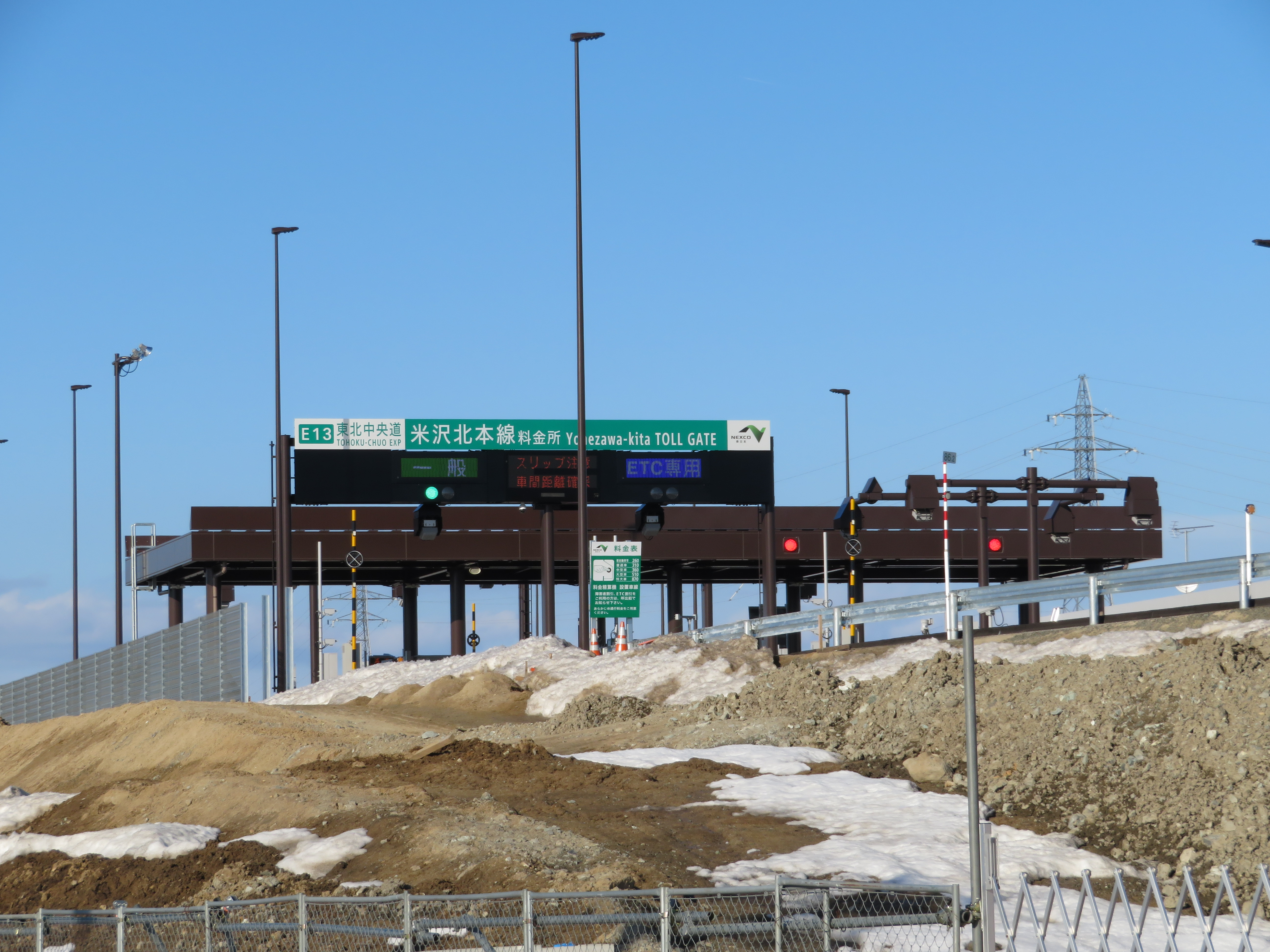 東北中央自動車道米沢北本線料金所（側道より撮影）